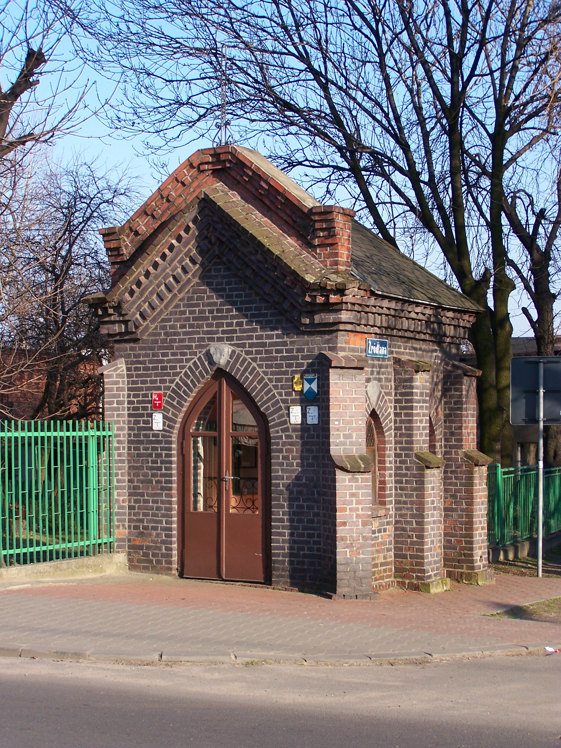 Zabytkowa kapliczka przy ulicy Źródlanej na Dębie w Katowicach.